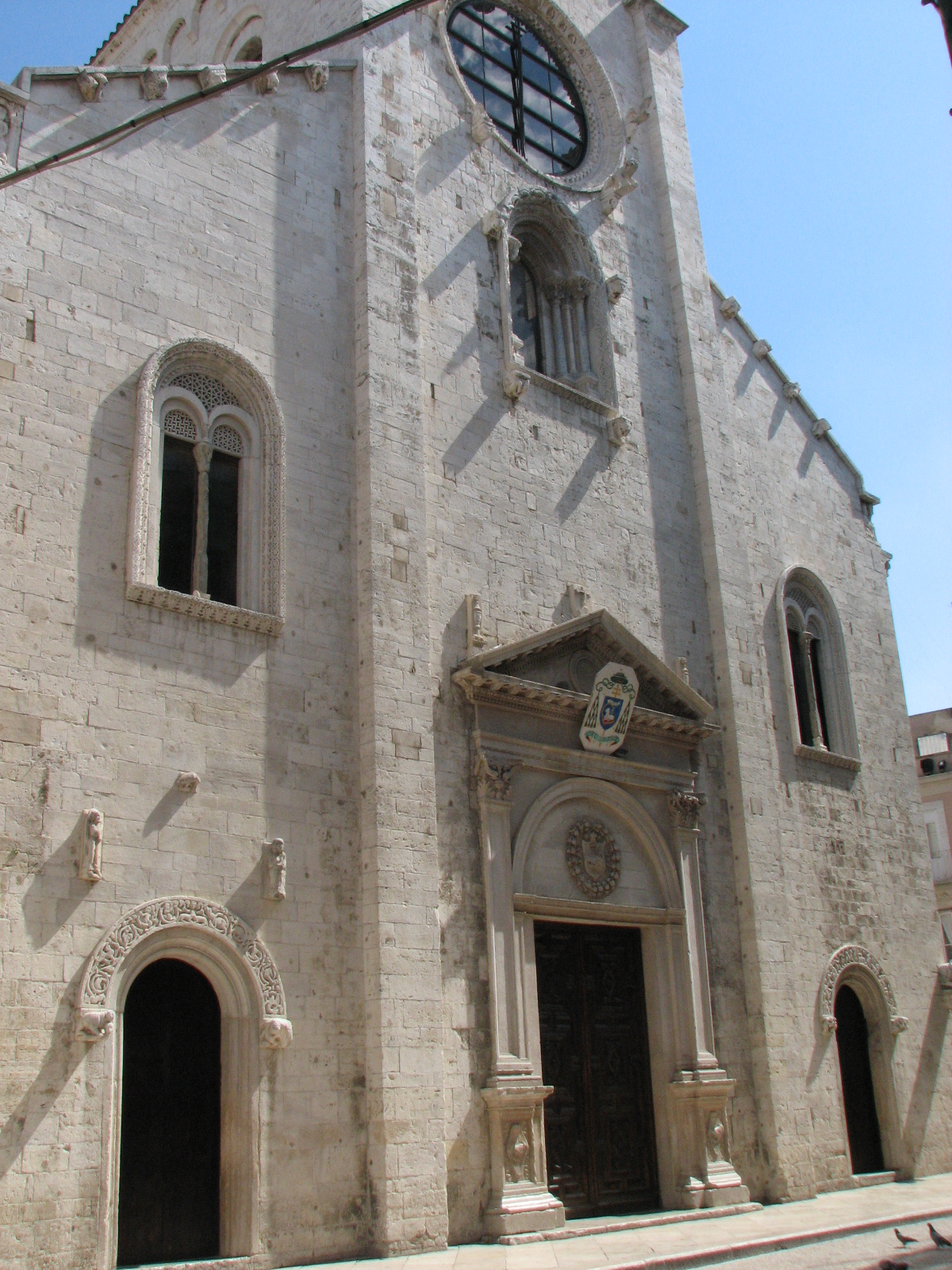 Barletta: La Cattedrale Santa Maria Maggiore - Fronte principale